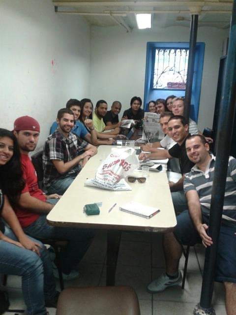 Primeira assembléia da Liga Atlética das Fatecs com a primeira diretoria eleita e os representantes das primeiras Fatecs filiadas.